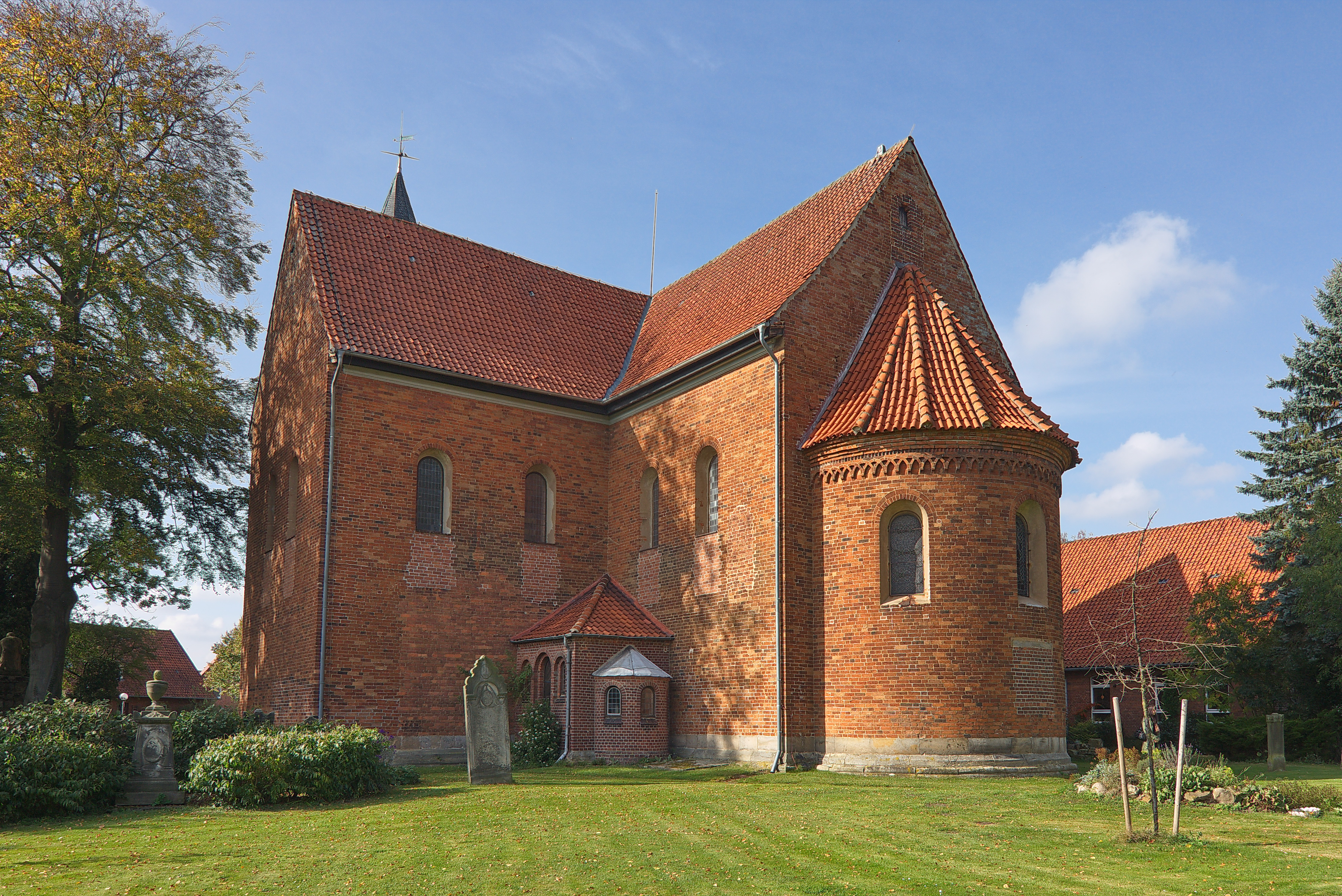 St. Osdag-Kirche in Mandelsloh (Neustadt am Rübenberge), Niedersachsen, Deutschland